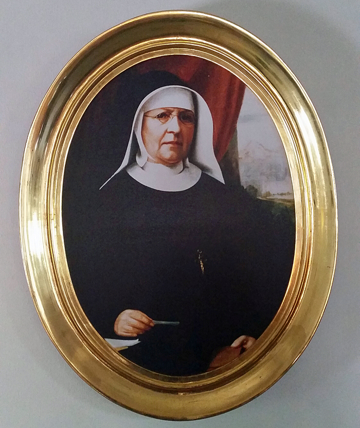 Mutter Maria Theresia Scherrer